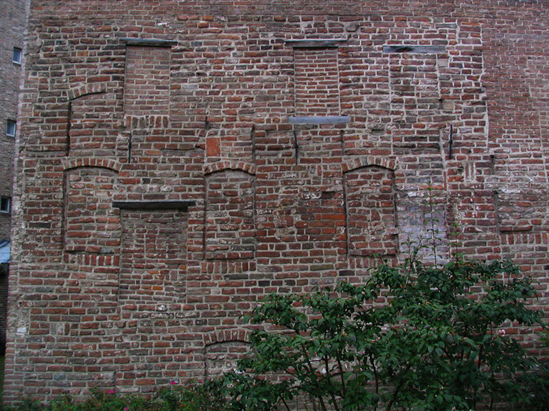 Muur met verschillende dichtgemetselde ramen en bogen. In gebruik door Stadsarchief en Athenaeumbibliotheek Deventer.